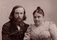 יהושע ואולגה חנקין, ז'נבה 1901